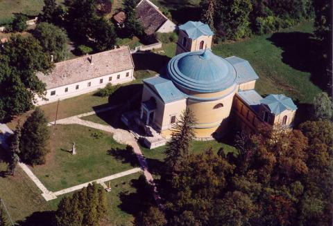 Ganna, Hungary, aerialphotogfraphy. Szent Kereszt Felmagasztalása római katolikus templom